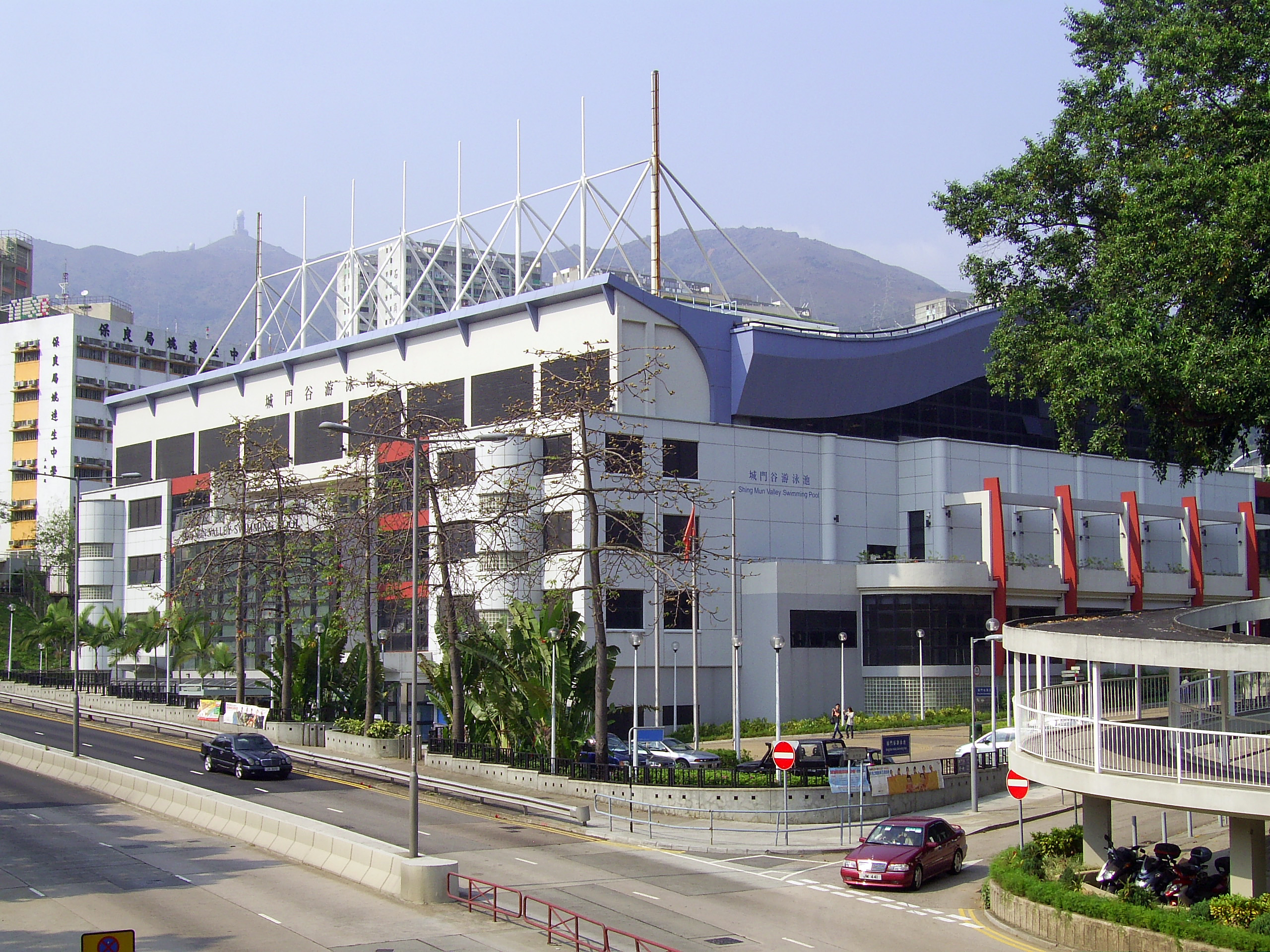 中文（香港）: 城門谷游泳池